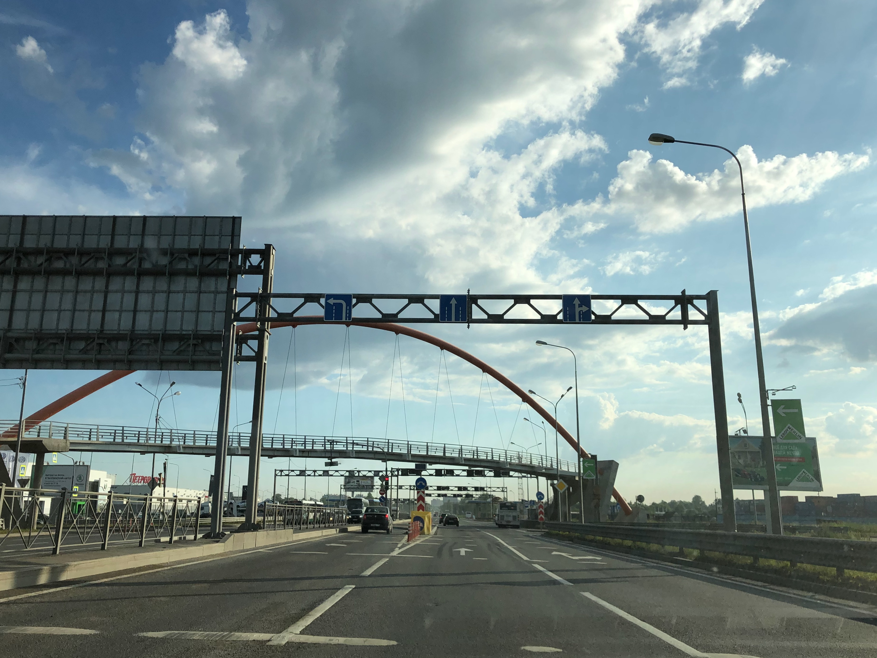 Красносельское шоссе